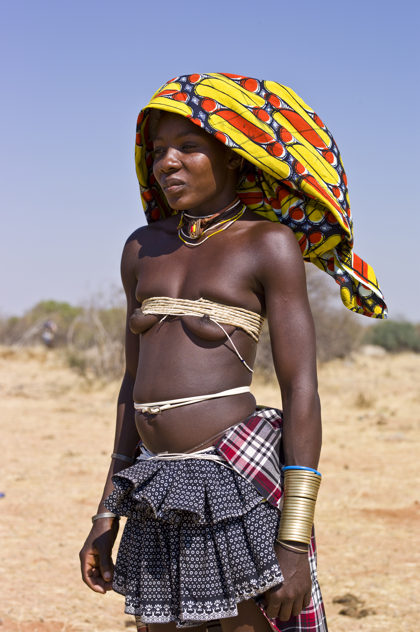 A Mucubal woman near Virei, Angola